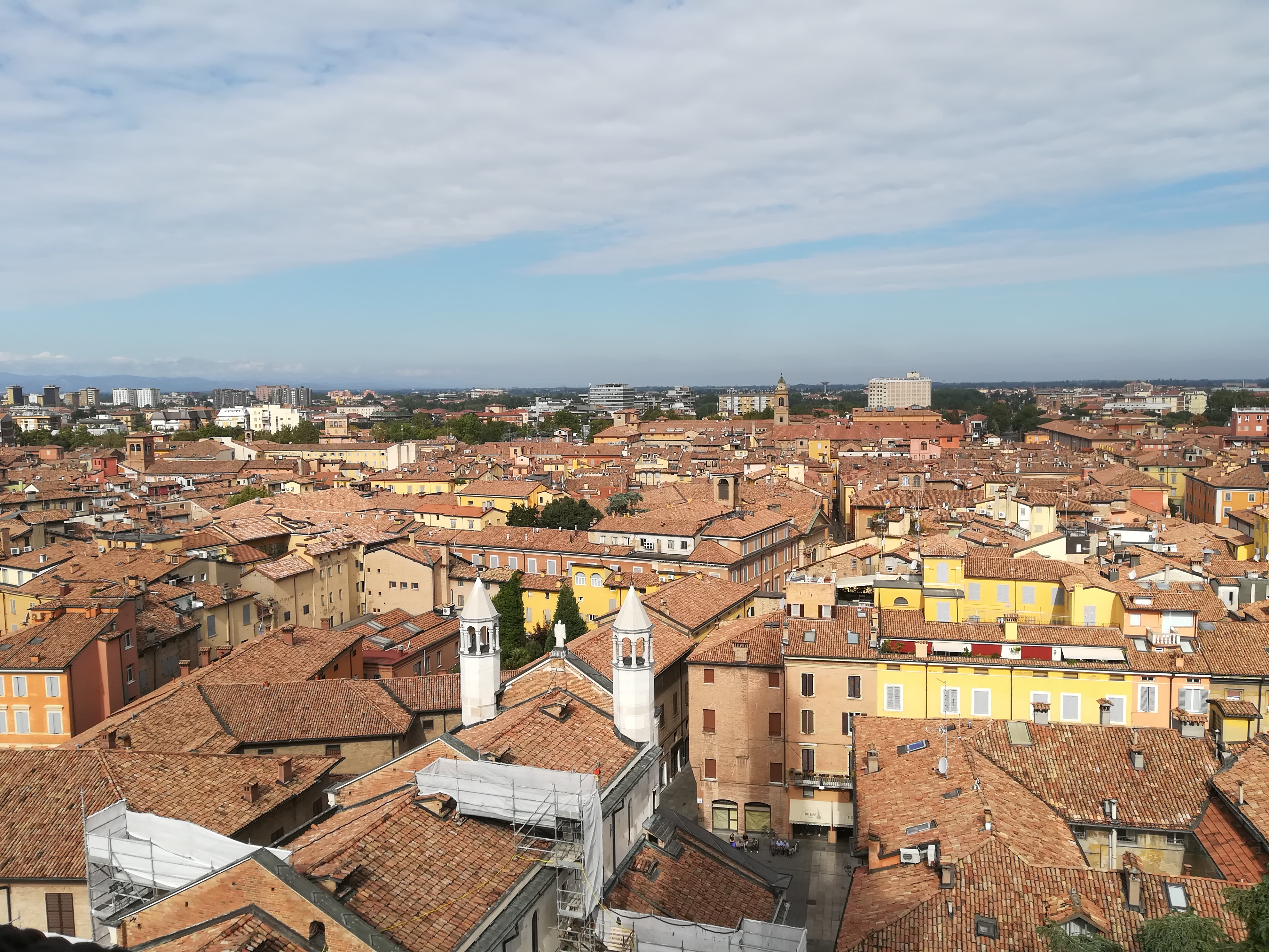 Panorama modenese